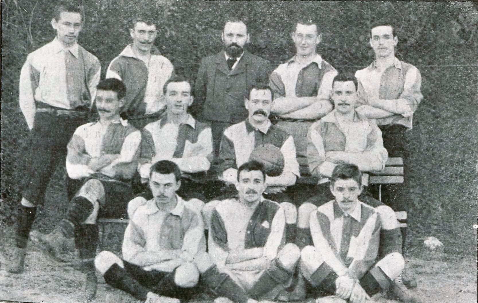 L'équipe du Havre AC en 1899. debout : Meyer, Ferris, W. Mason, A. Wilkes Taylor assis : Sewis, C. Wilkes, F. Mason, Muir accroupis : Quigard, Carré, Bacquart